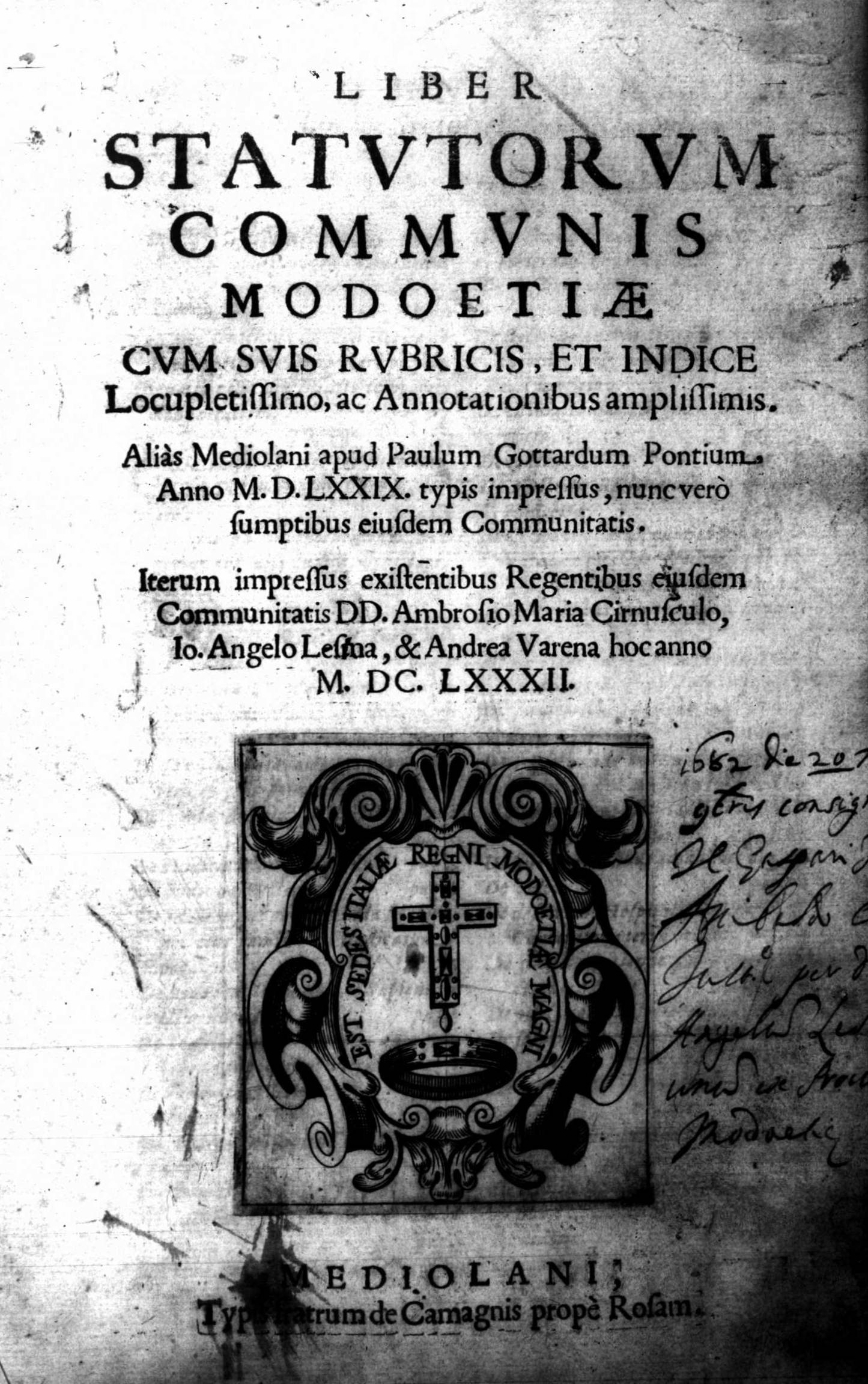 Frontespizio